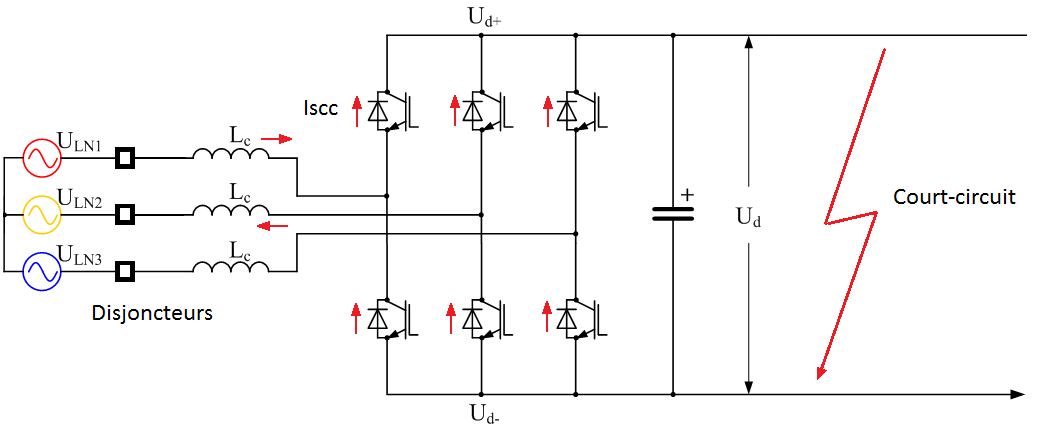 Illustration de la circulation du courant de court circuit dans un VSC au début du défaut.